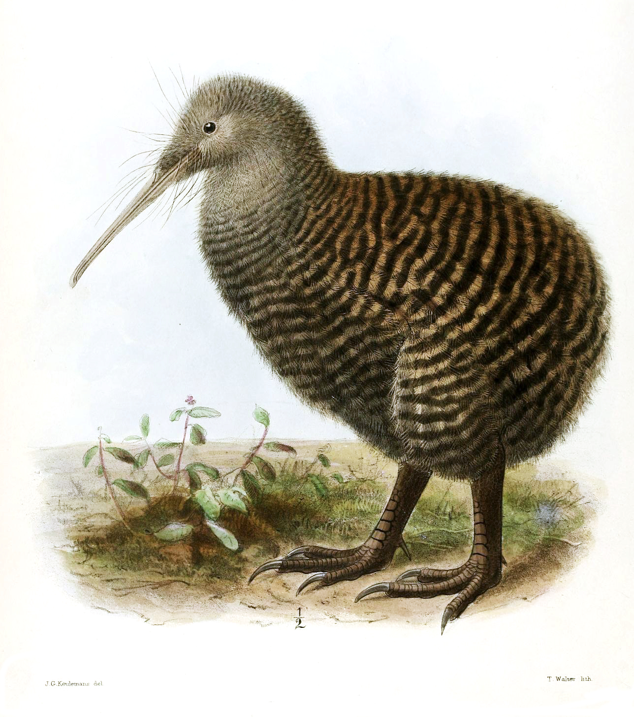 Apteryx haastii female